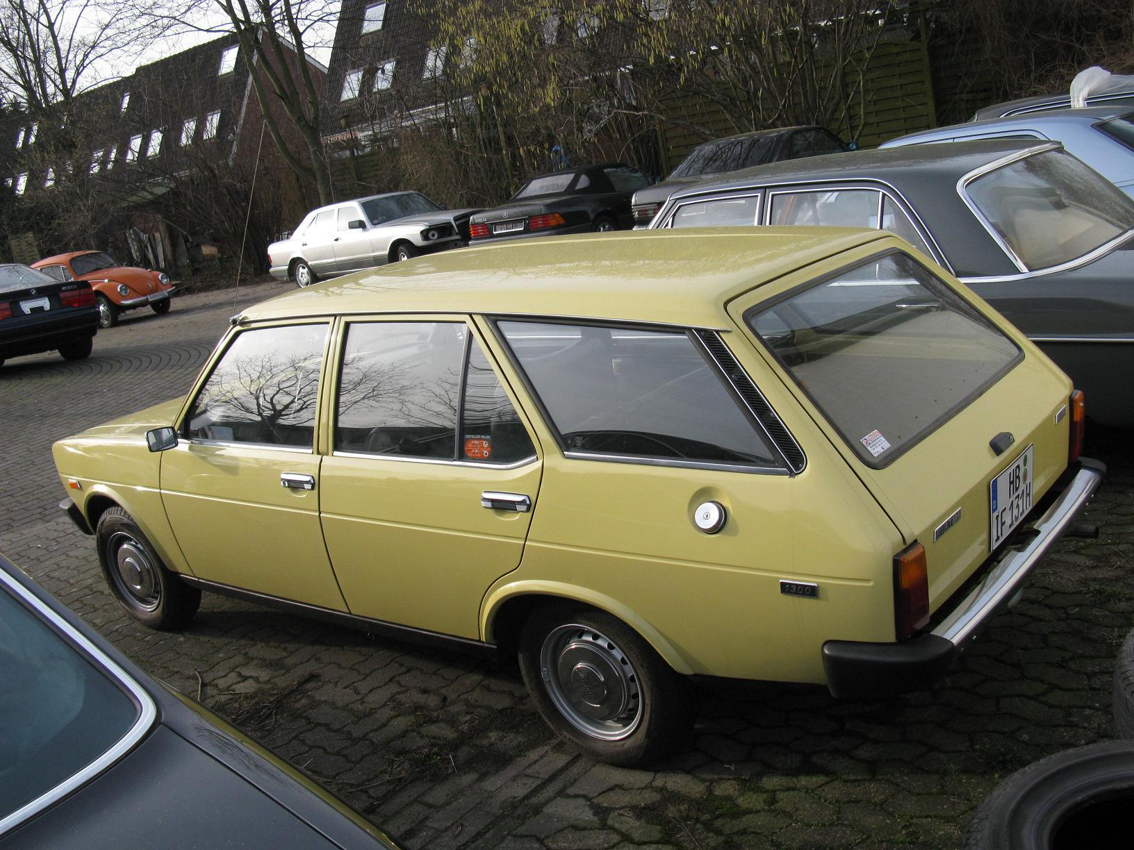 Fiat 131 Estate